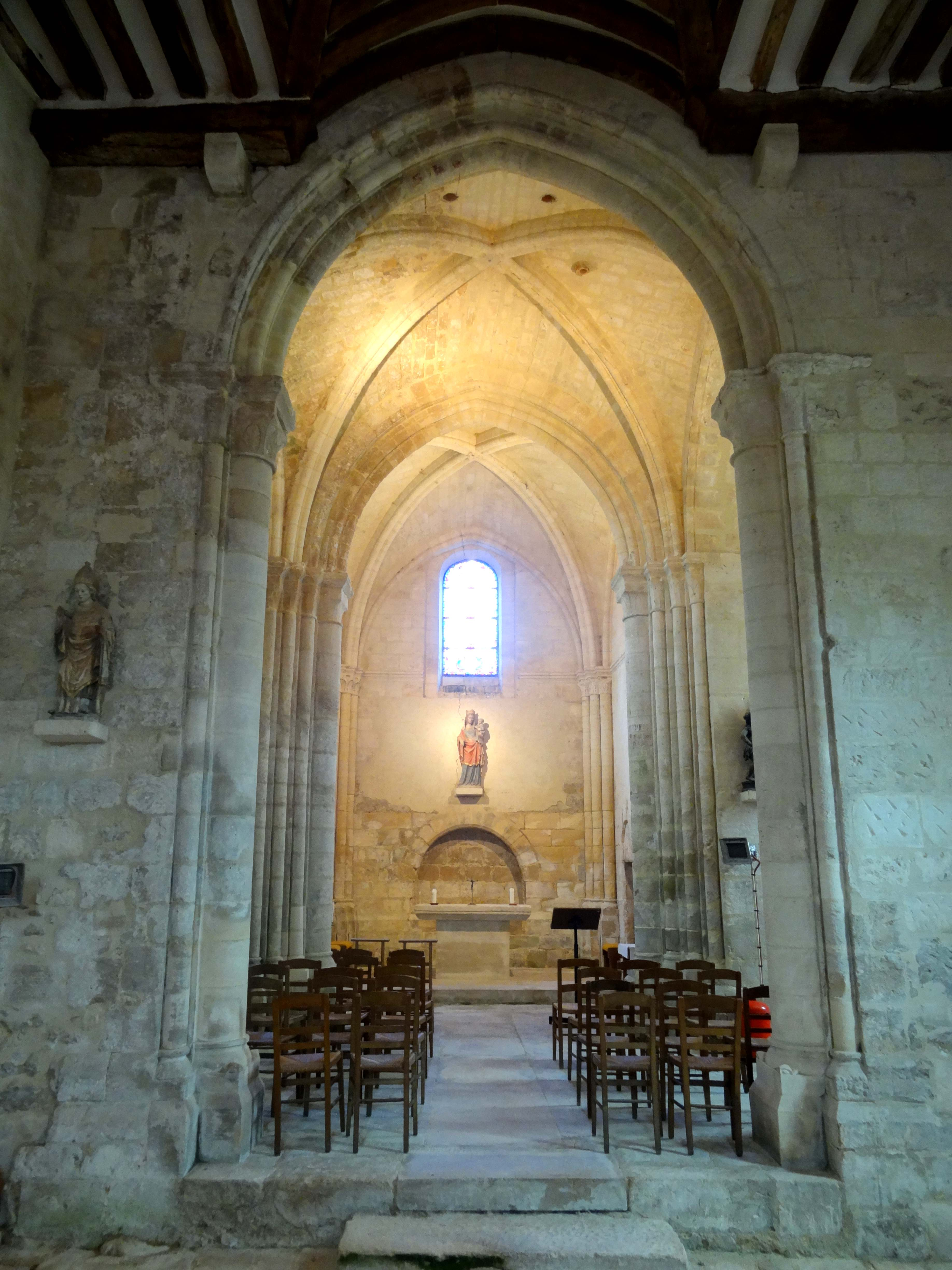 Intérieur de l'église - voir titre.